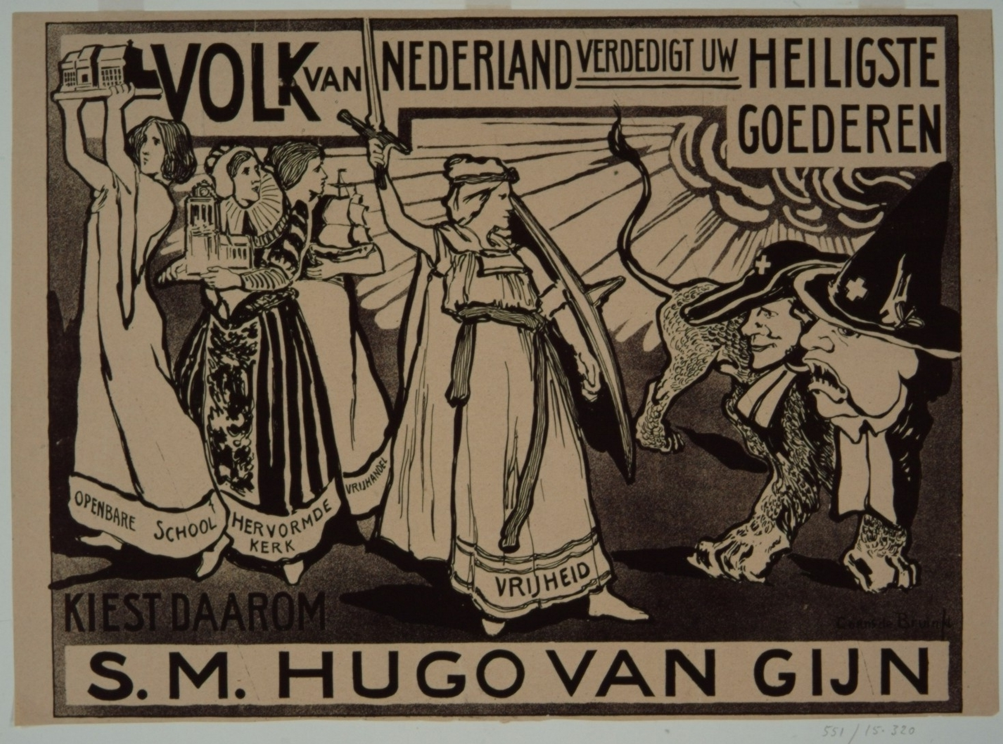 Affiche van de Kiesvereeniging Burgerplicht voor de verkiezing van leden van de Tweede Kamer op 16 mei 1905 met daarop de Vrijheid, met zwaard en schild gewapend, die de Hervormde kerk, de vrijhandel en de openbare school verdedigt tegen een tweekoppig monster: de antirevolutionairen en katholieken als opschrift 'Volk van Nederland, verdedigt uwe heiligste goederen, kiest daarom S.M. Hugo van Gijn'.